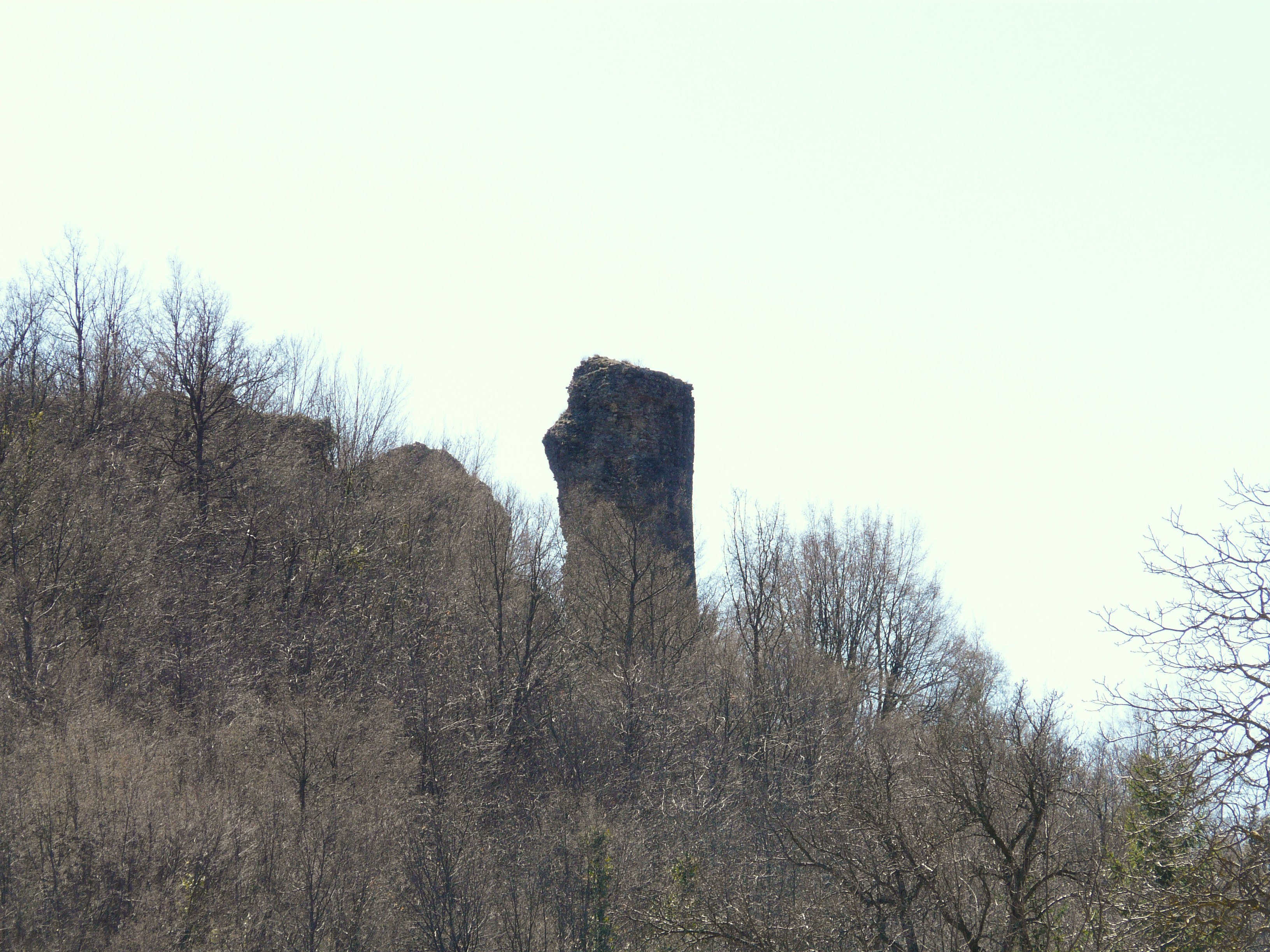 Ruderi del castello di Montoggio, Liguria, Italia